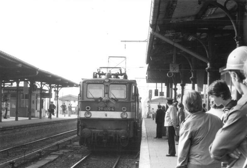 ADN-ZB Senft 6.2.84 Berlin: Elektrifizierung Auf dem Bahnhof Berlin-Schöneweide traf der erste von einer Elektrolok gezogene Reisezug ein. Mit der Fertigstellung des 13 Kilometer langen elektrifizierten Streckenabschnitts von Schönefeld und Grünau lösen die Montagekollektive der Bahn und ihre Kooperationspartner aus Industrie und Bauwesen eine bedeutende Verpflichtung ein, die sie zur Verwirklichung des Zentralen Jugendobjektes "Streckenelektrifizierung" übernommen haben.